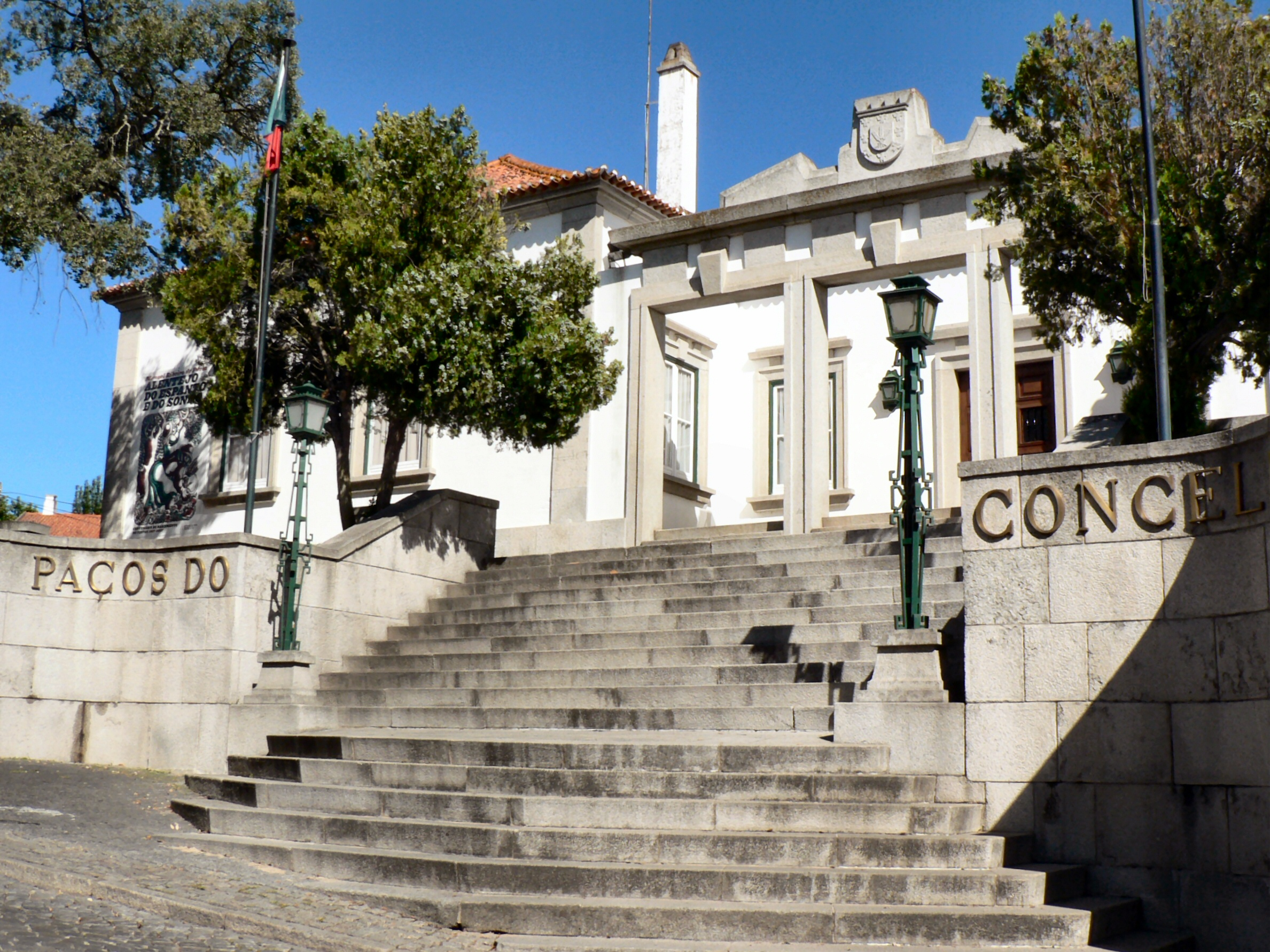 Edifício dos Paços do Concelho em Mora